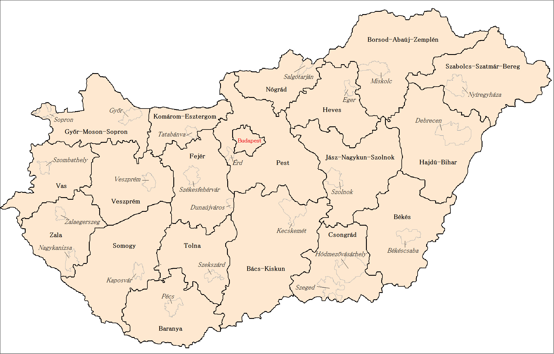 ハンガリーの行政区画。 County, capital city(Budapest), Town with county rights (urban county).